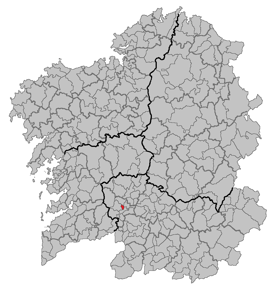 Mapa coa localización do concello de Beade.